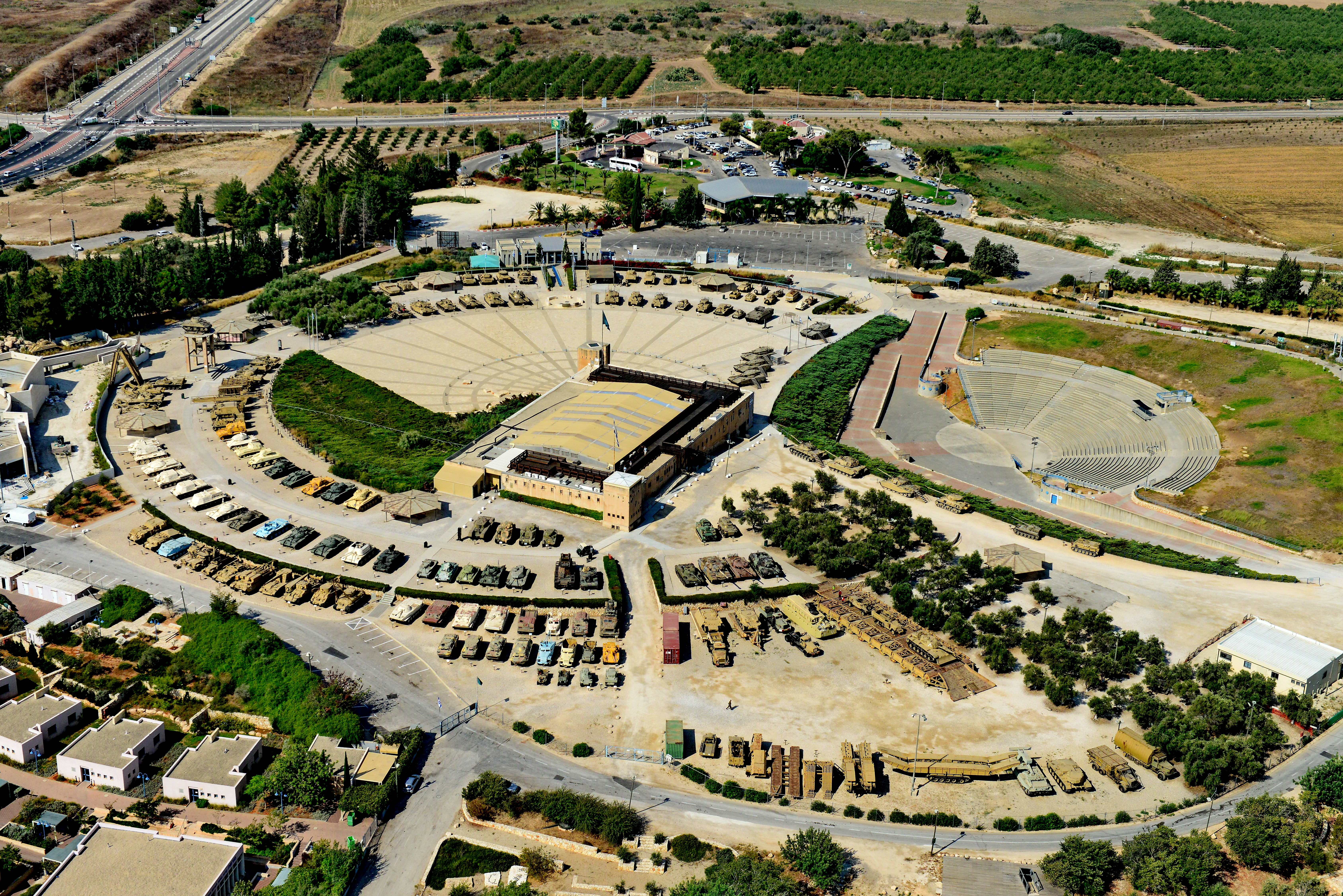 אתר הנצחה לחללי חיל השריון במערכות ישראל. האתר כולל מוזיאון לתולדות השריון ואוסף של טנקים ורכב קרבי משוריין. האתר נמצא בלטרון שבעמק איילון, במצודת טגארט של משטרת לטרון שהקימו שלטונות המנדט הבריטי בשנת 1940.